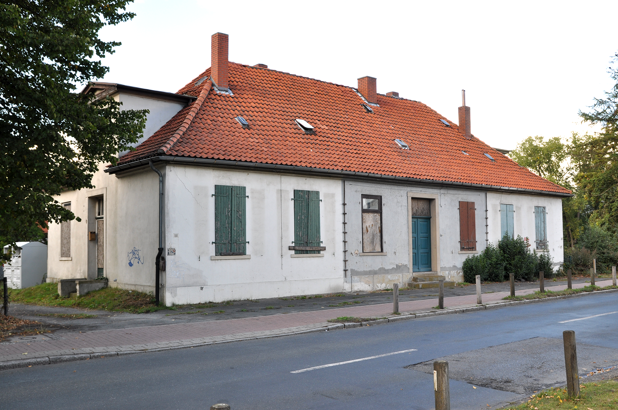 Zöllnerwohnhaus in Bremen, Warturmer Heerstraße 119Das abgebildete Objekt ist ein geschütztes Kulturdenkmal in der Freien Hansestadt Bremen, mit der Nr. 1197 beim Landesamt für Denkmalpflege registriert.